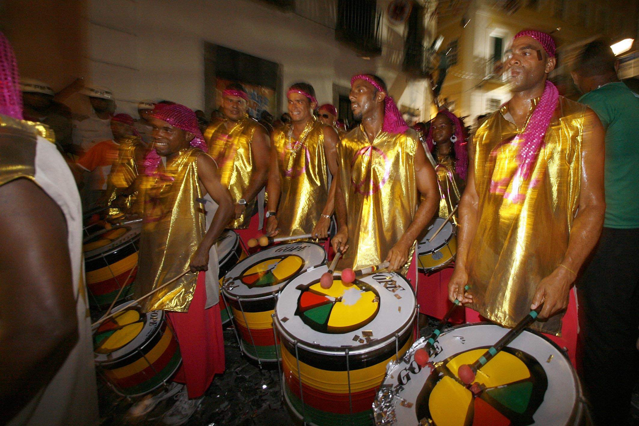 Saída do Bloco Afro Olodum